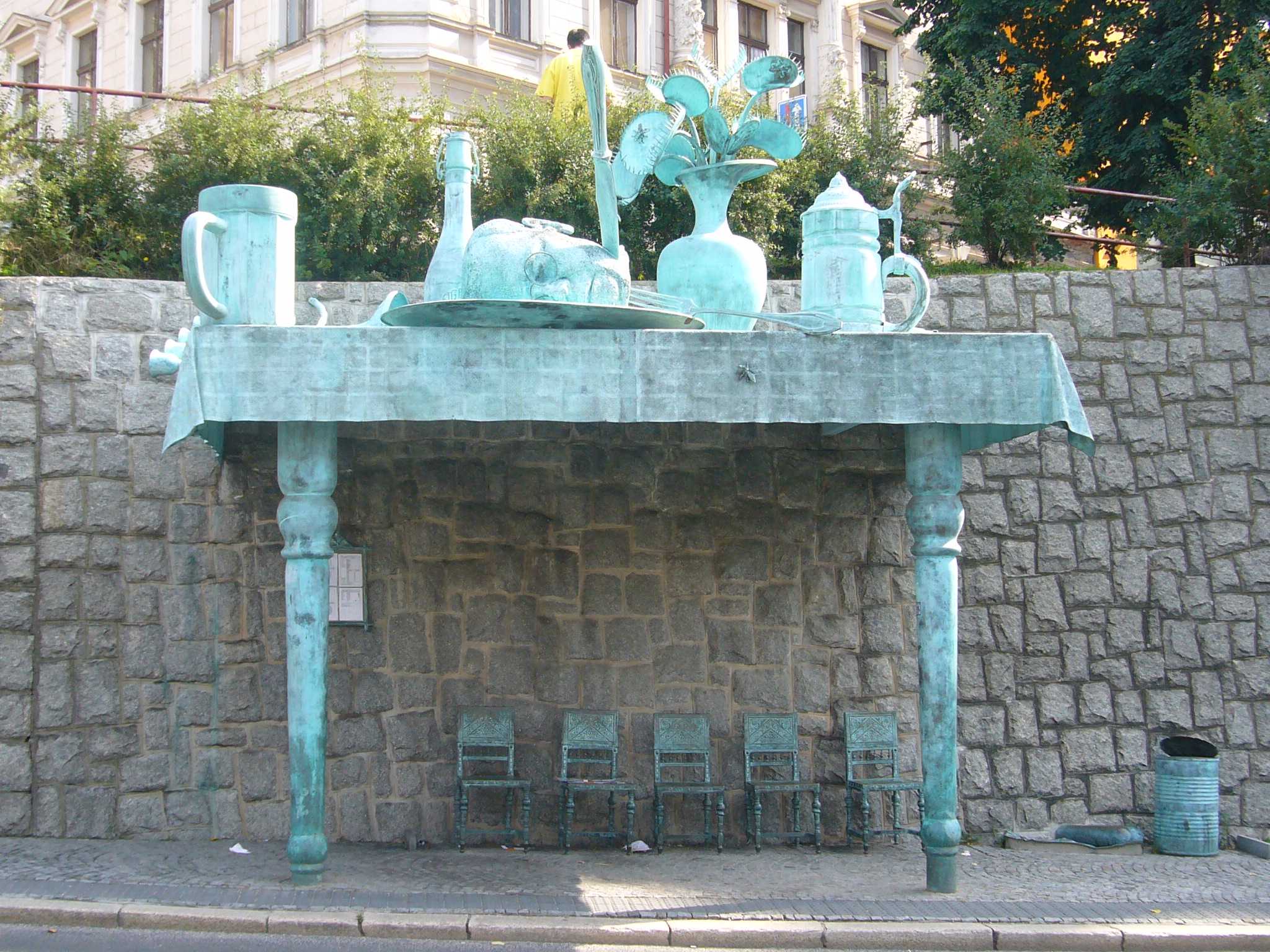 Česky: Liberec, zastávka „Sokolská u zdi“, David Černý: Hostina obrů.